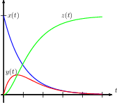 Gráfico das funções de uma reação químicas dadas pela Transformada de Laplace